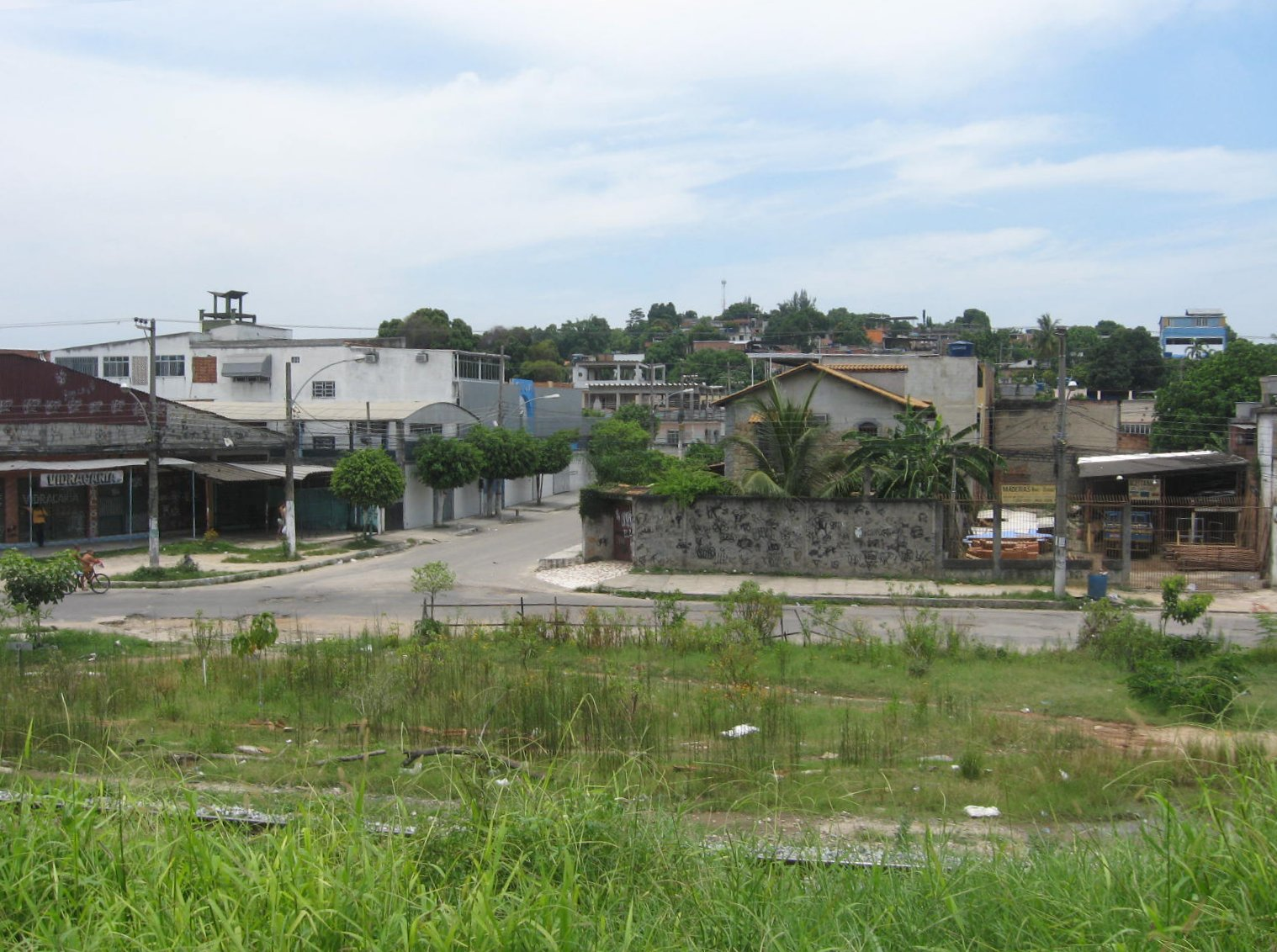 Vista do bairro de Éden, em São João de Meriti, estado do Rio de Janeiro, Brasil.